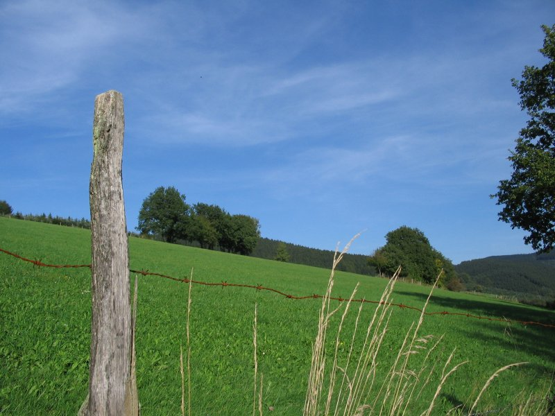 Oberhundem in der Gemeinde Kirchhundem, NRW, Deutschland